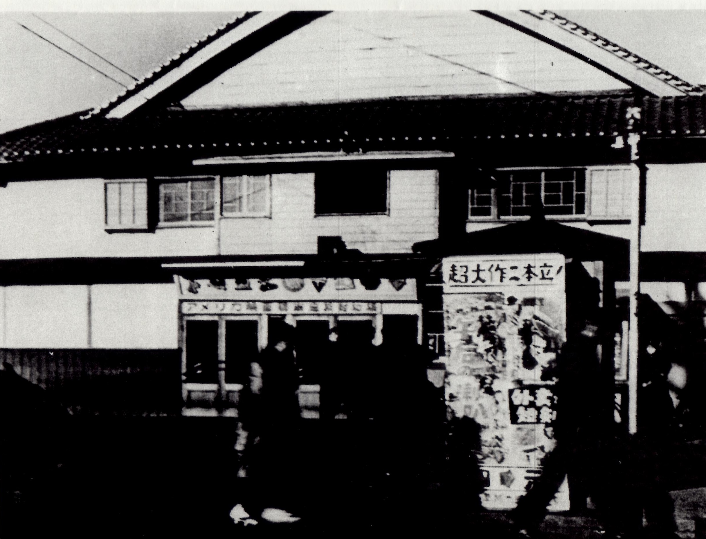 蓬莱座の後継館である劇場・映画館「寿々喜座」。愛知県碧南市。